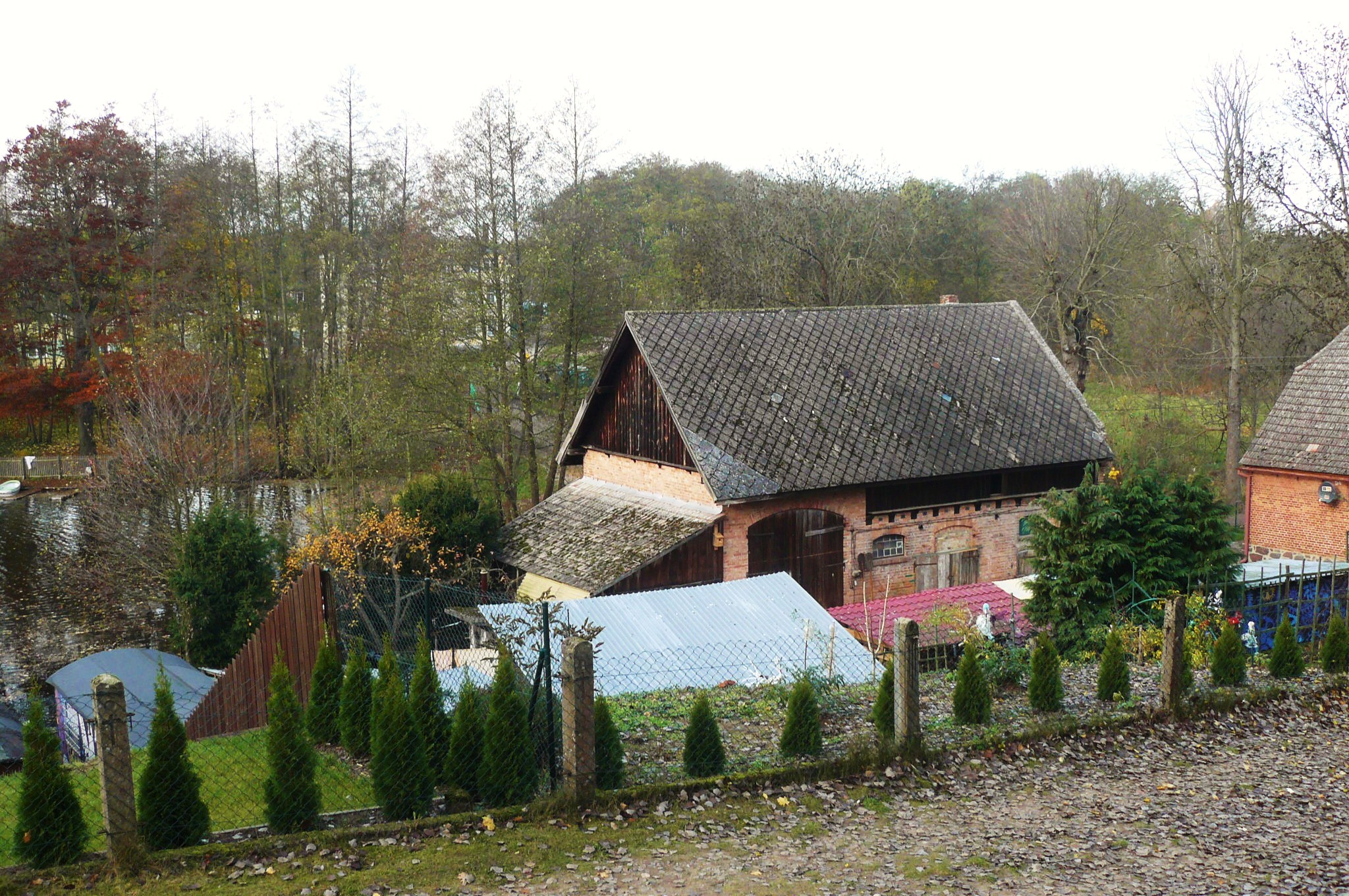 Goszczanowo i Staw Goszczanowski.